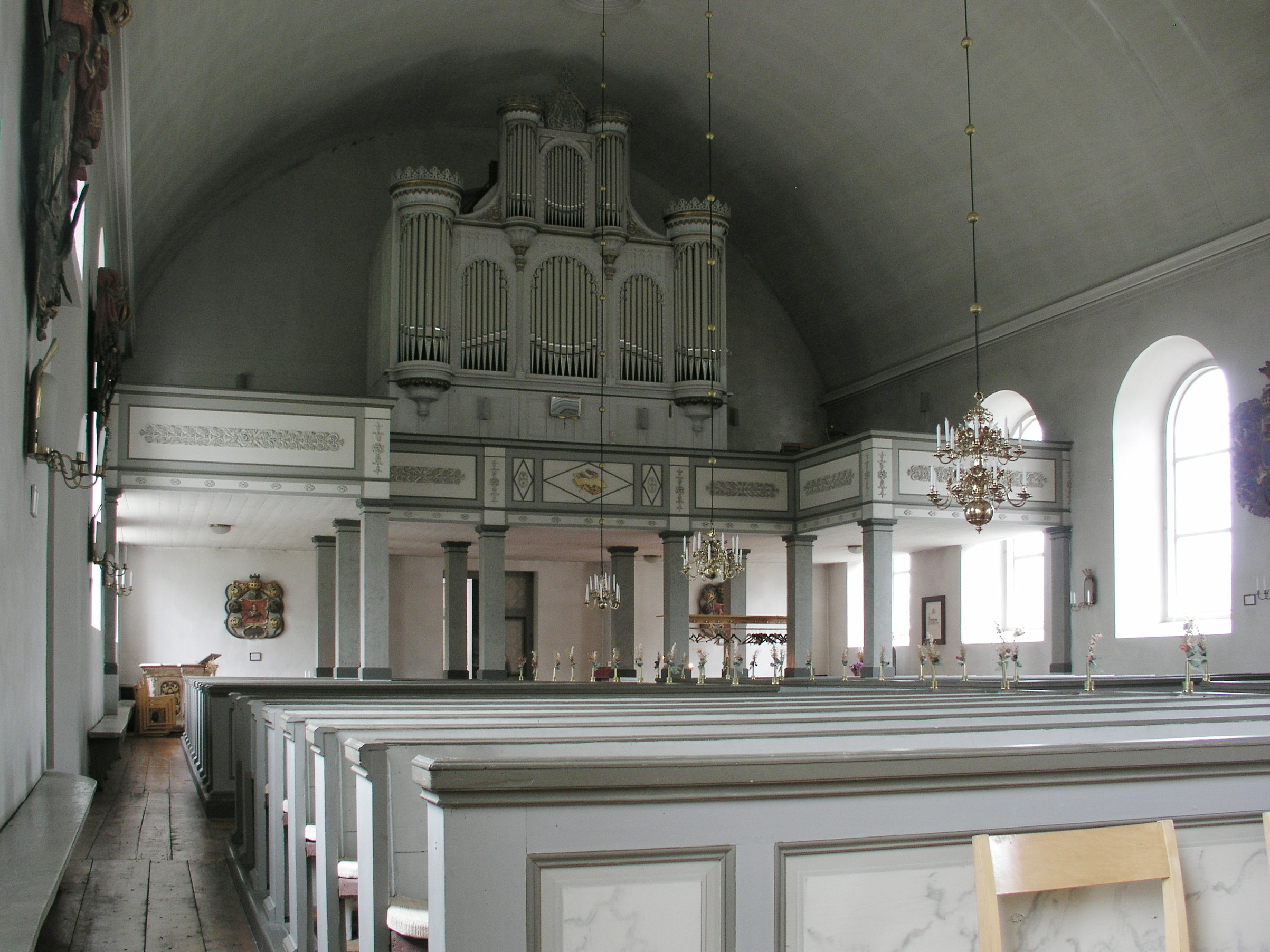 Röks kyrka, Organ